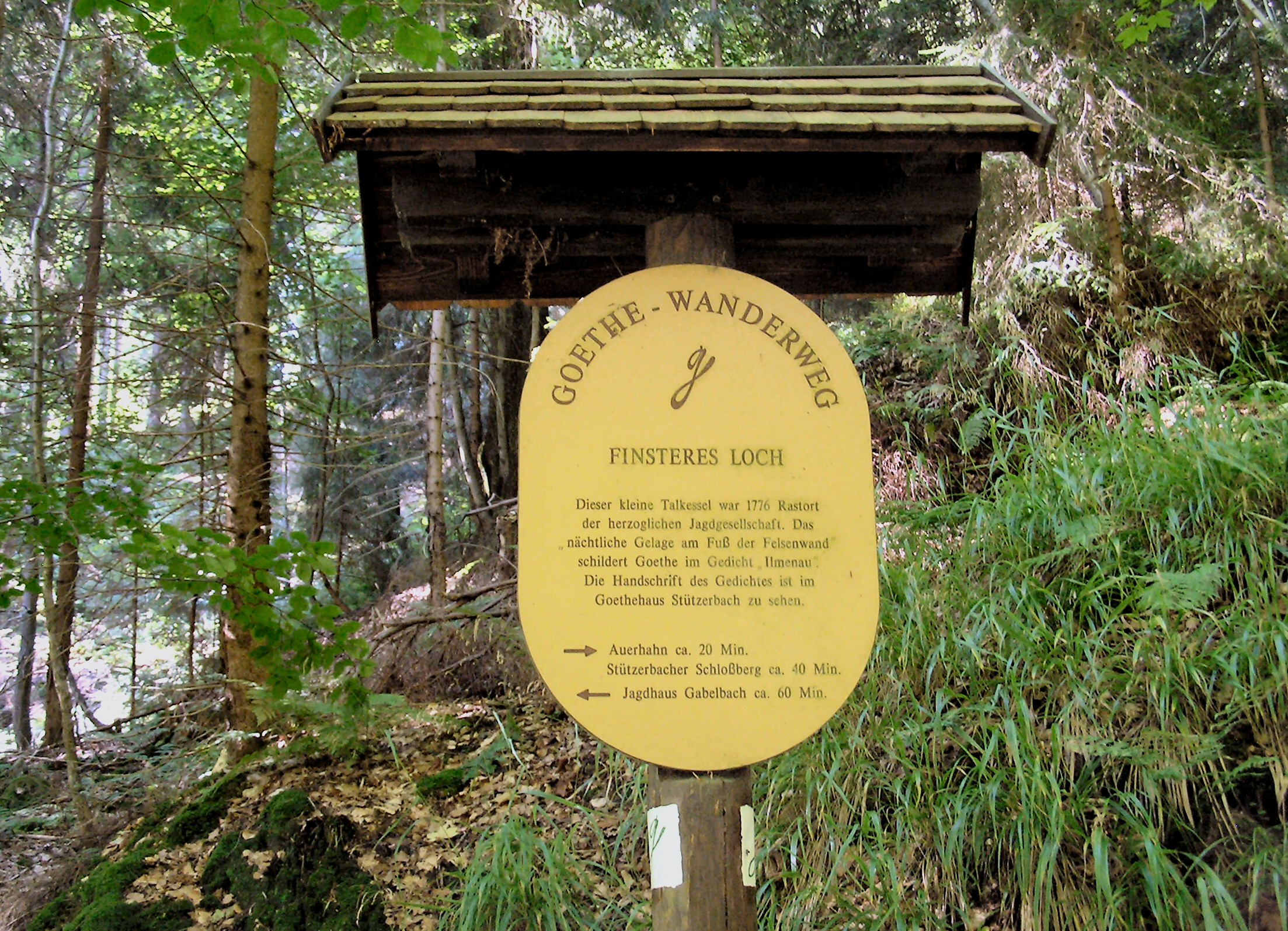 Finsteres-Loch - Der Goethewanderweg ist ein 19 Kilometer langer Wanderweg im Thüringer Wald, der von Ilmenau (Thüringen) über Manebach nach Stützerbach führt und dabei 17 Wirkungsstätten Johann Wolfgang von Goethes, von dem 28 Besuche Ilmenaus nachgewiesen sind, verbindet. Der Goethewanderweg ist durch ein g gekennzeichnet und mit zahlreichen Informationstafeln an allen bedeutenden Stätten ausgestattet.